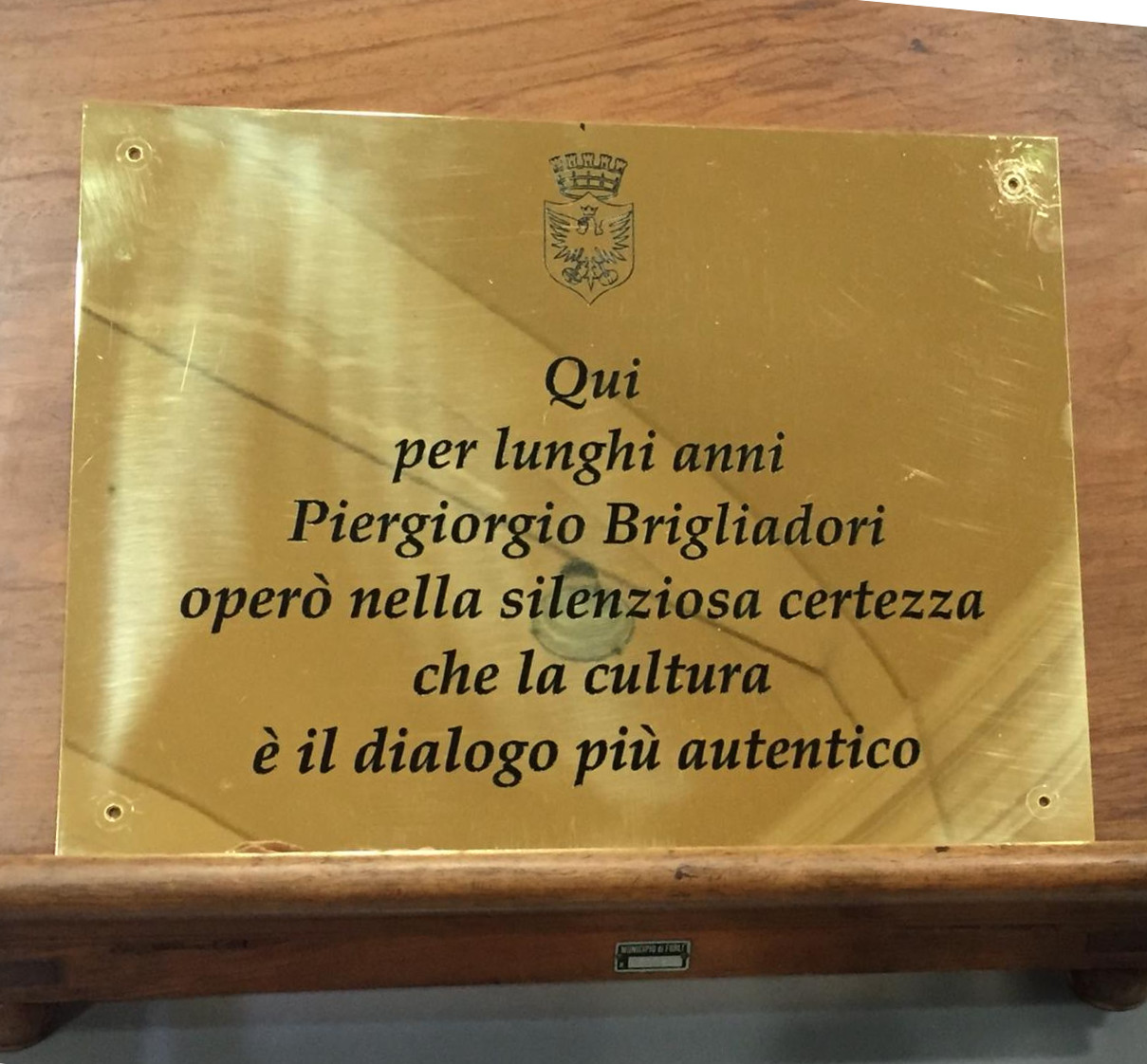 Targa in onore di Piergiorgio Brigliadori collocata nella biblioteca Aurelio Saffi di Forlì